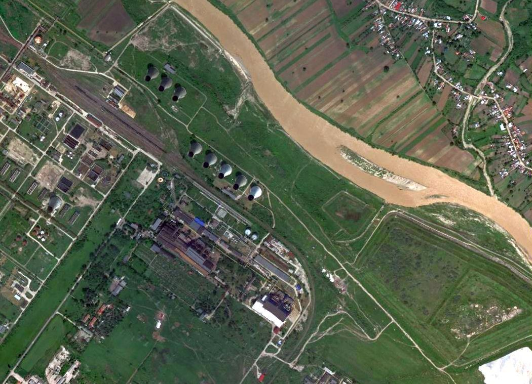 Termocentrala Borzești hartă satelit.